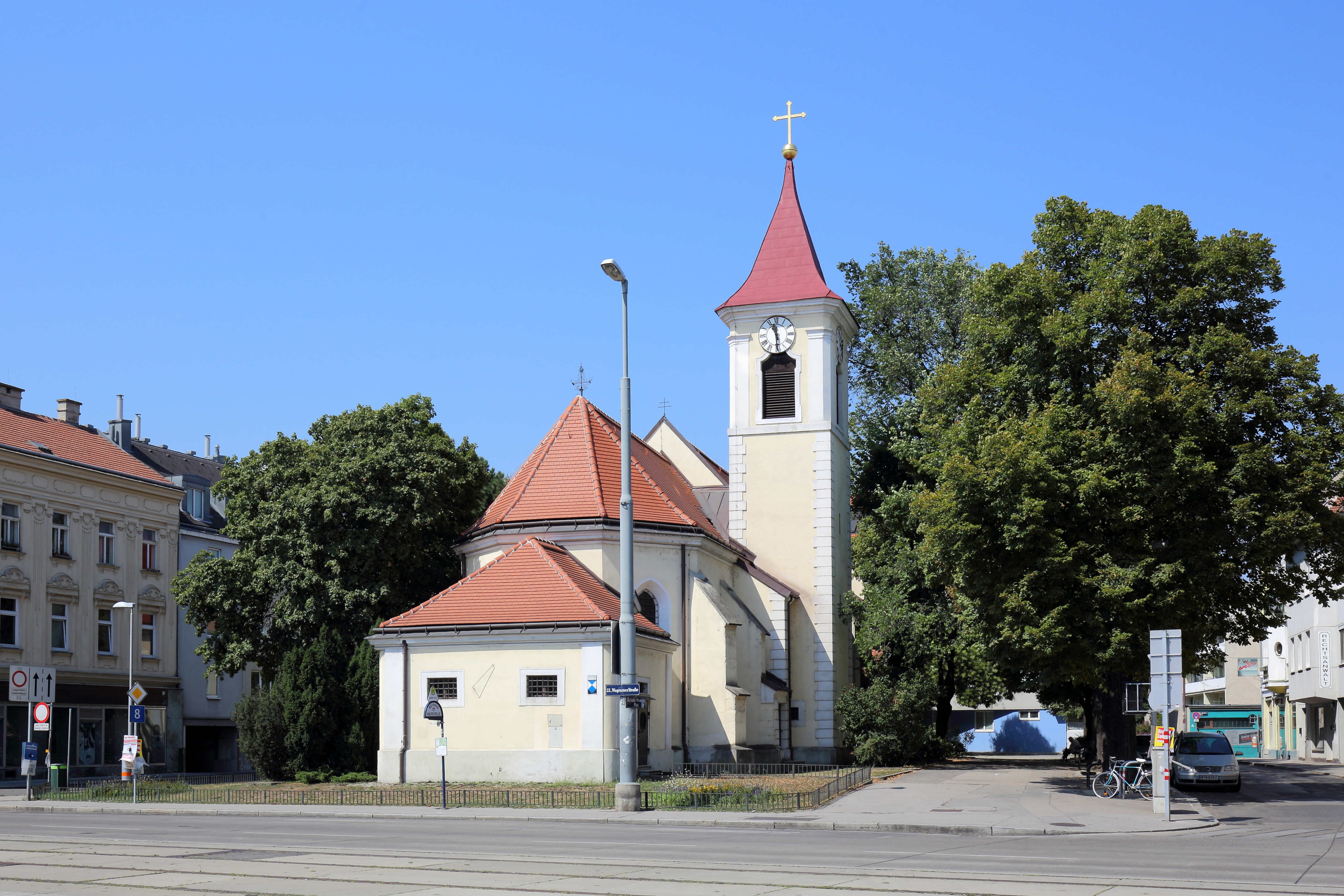 Ostansicht der röm.-kath. Pfarrkirche hl. Georg in Kagran, ein Ortsteil des 22. Wiener Gemeindebezirkes Donaustadt.Die Kirche ist bereits im 15. Jahrhundert als einschiffige Dorfkirche nachweisbar. Der gotische Chor wurde 1438 errichtet und 1642 erfolgte eine Erweiterung des Langhauses. Der Turm mit Ortsteingliederung ist im Kern ebenfalls gotisch, Glockengeschoß und Spitzhelm sind aus dem 17. Jahrhundert. Um die Kirche befand sich der Kagraner Friedhof, dieser wurde 1890 gesperrt und 1902 aufgelassen.